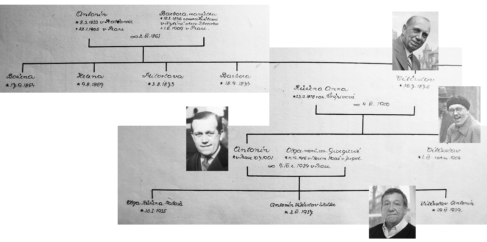 Faksimilie z rodokmenu Kumperů (podklad je z Kroniky Kolodějského zámku, kterou psal Antonín Kumpera v letech 1939-1944)